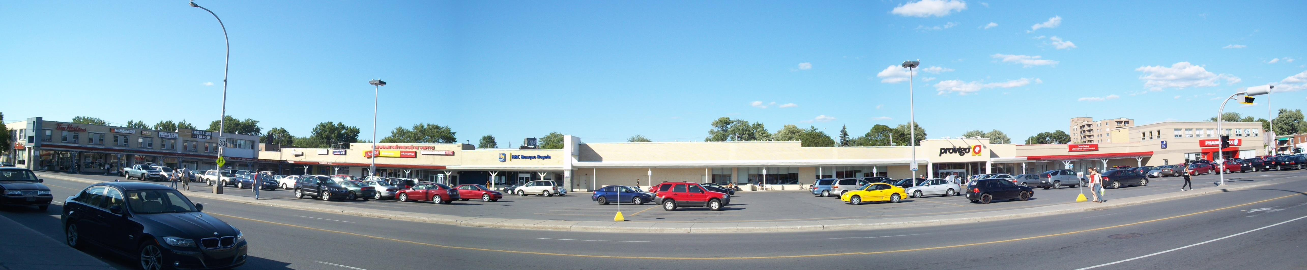 Galeries Norgate, boulevard Décarie, Montréal